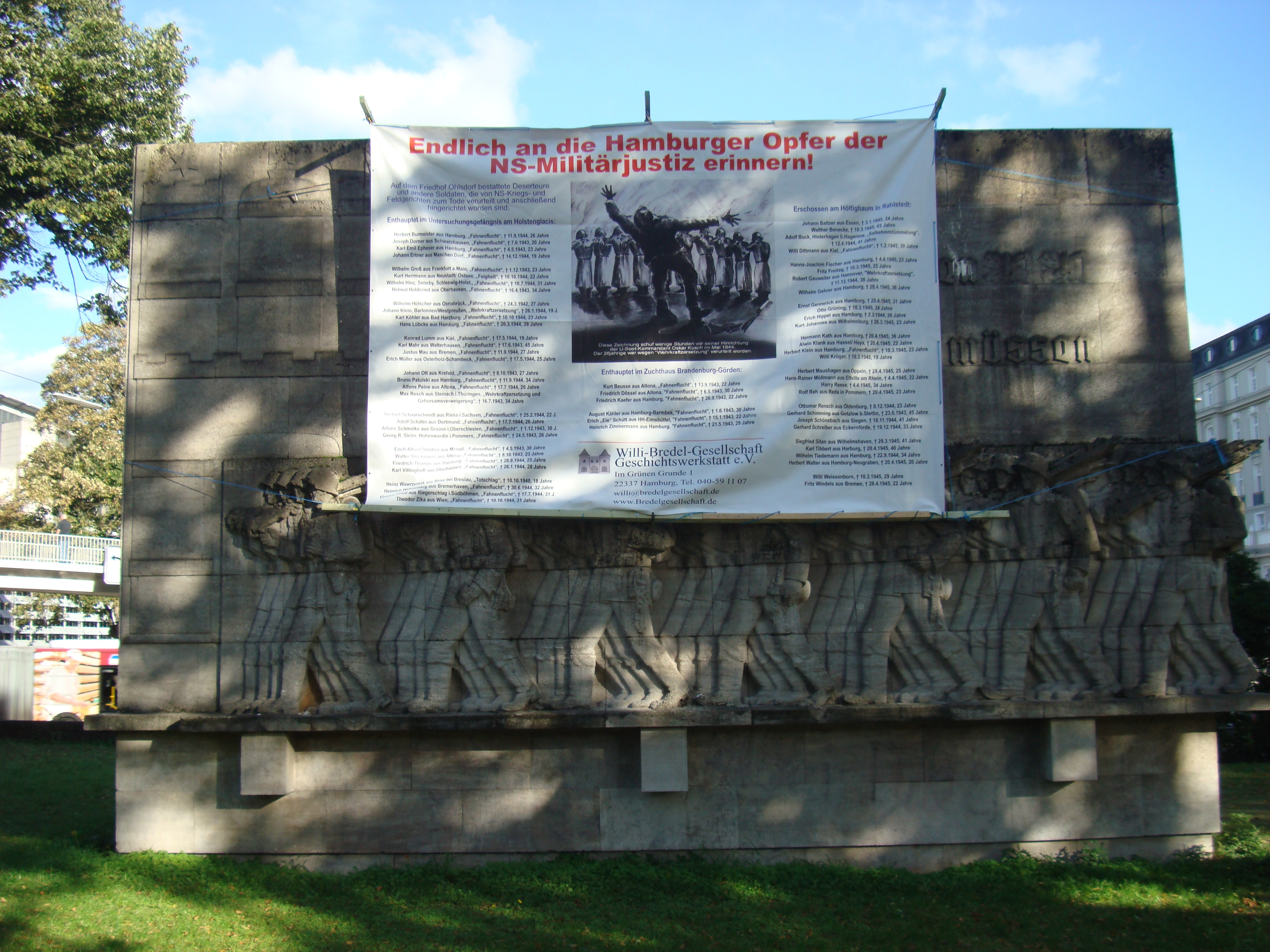 Plakat zur Erinnerung an die Verfolgten der Militärjustiz auf dem 76er Denkmal im Dammtor, Hamburg. Foto vom 21 September 2010